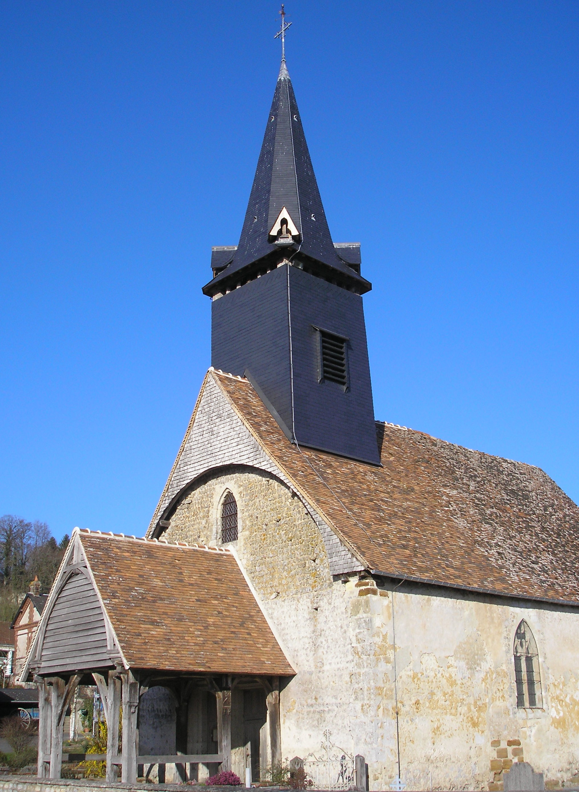 Courtonne-la-Meurdrac (Normandie, France). L'église Saint-Ouen.